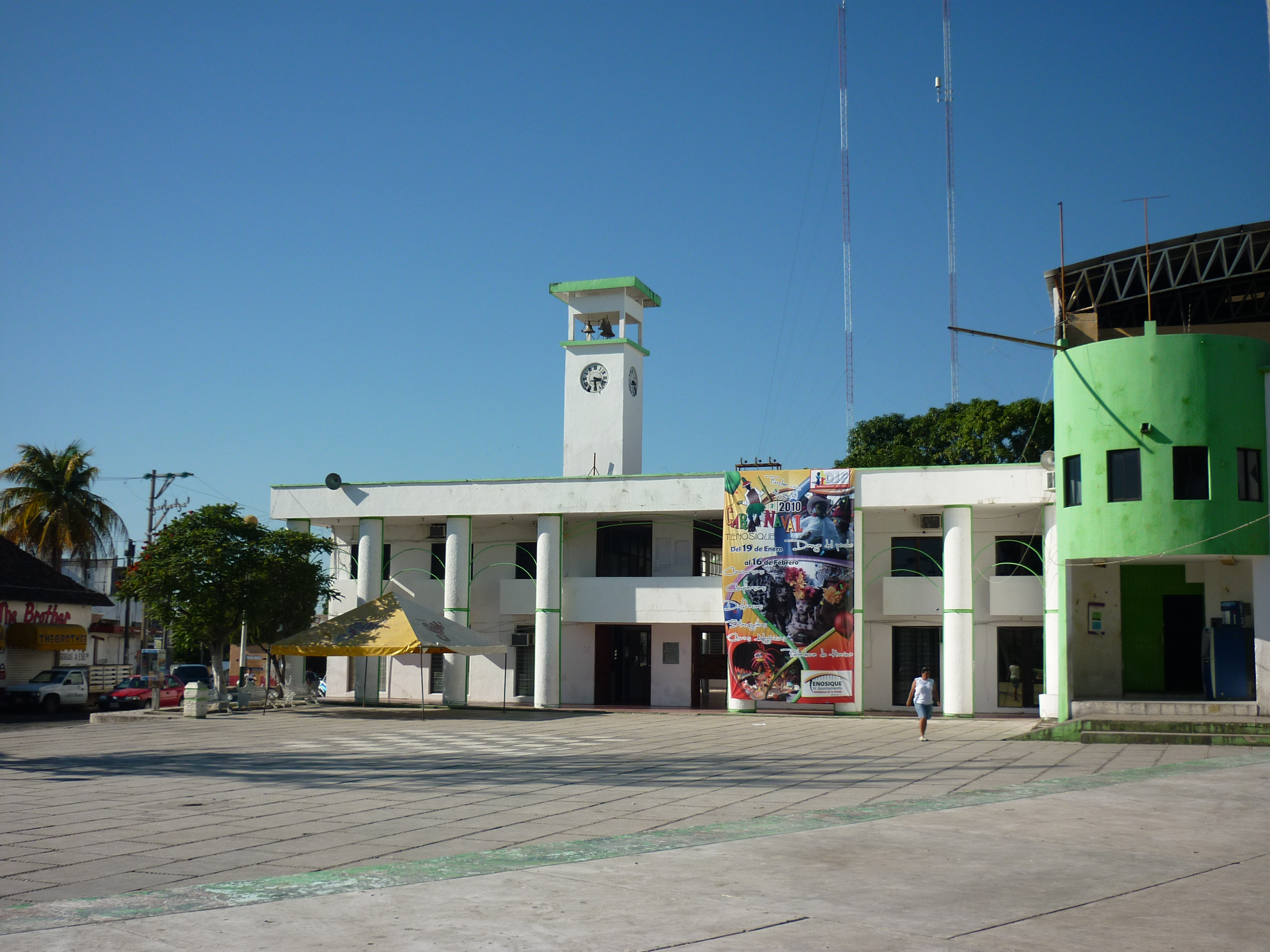 Ayuntamiento de la ciudad de Tenosique, Tabasco